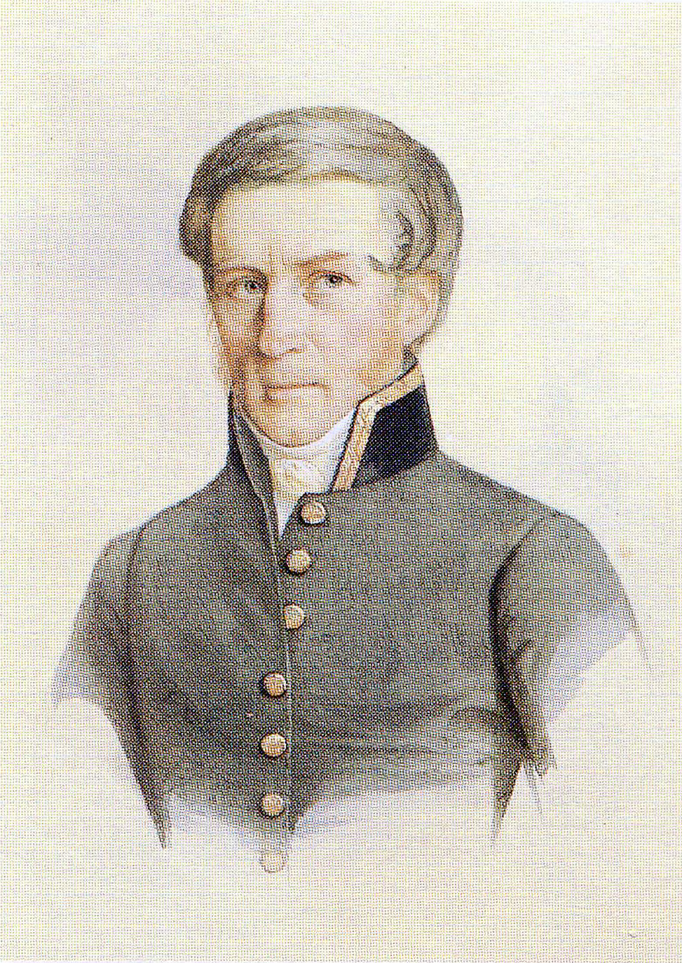 Suomen kielen lehtori Car. Axel Gottlund (1796–1875)